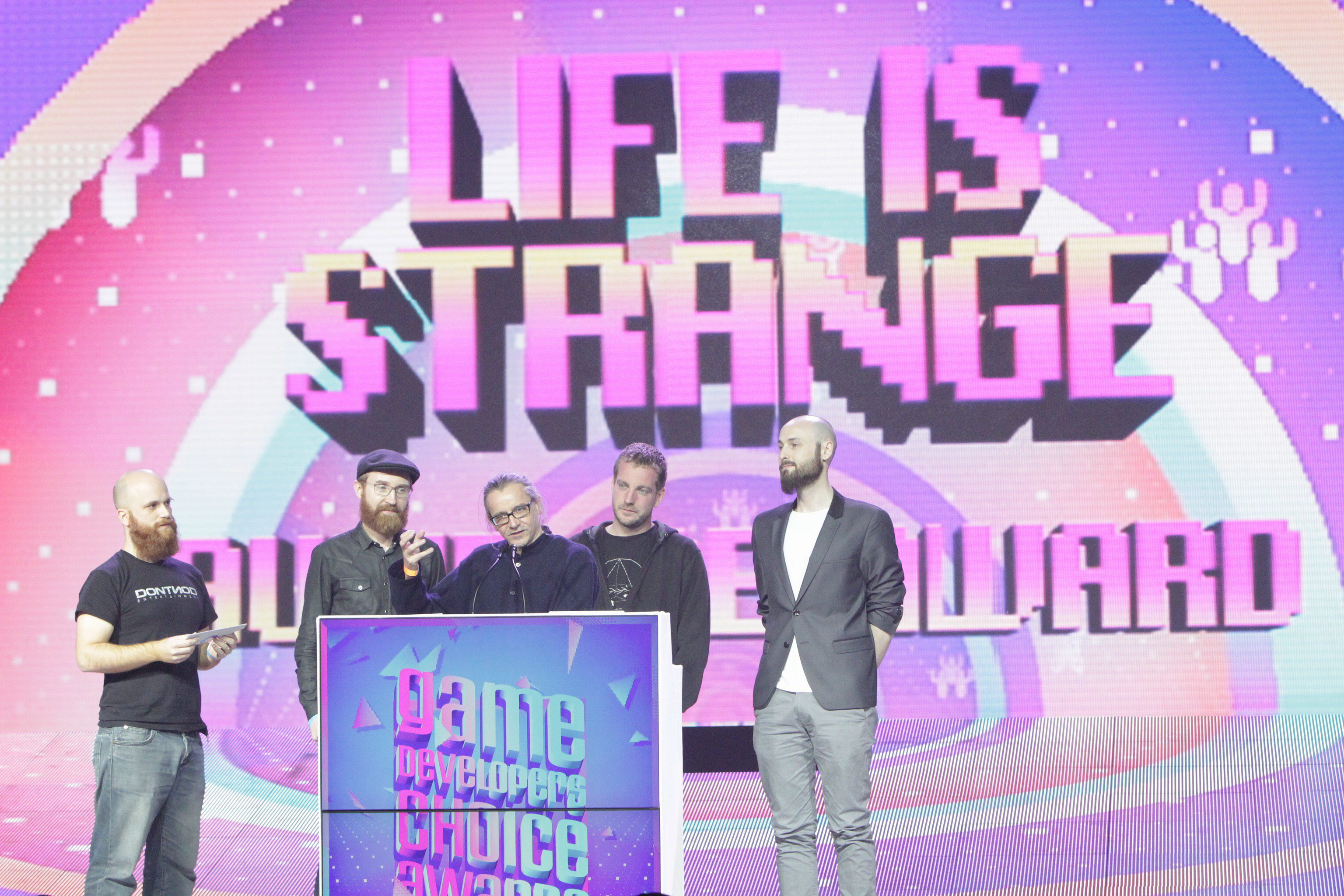 16-20_52_32-01-7D1_0959